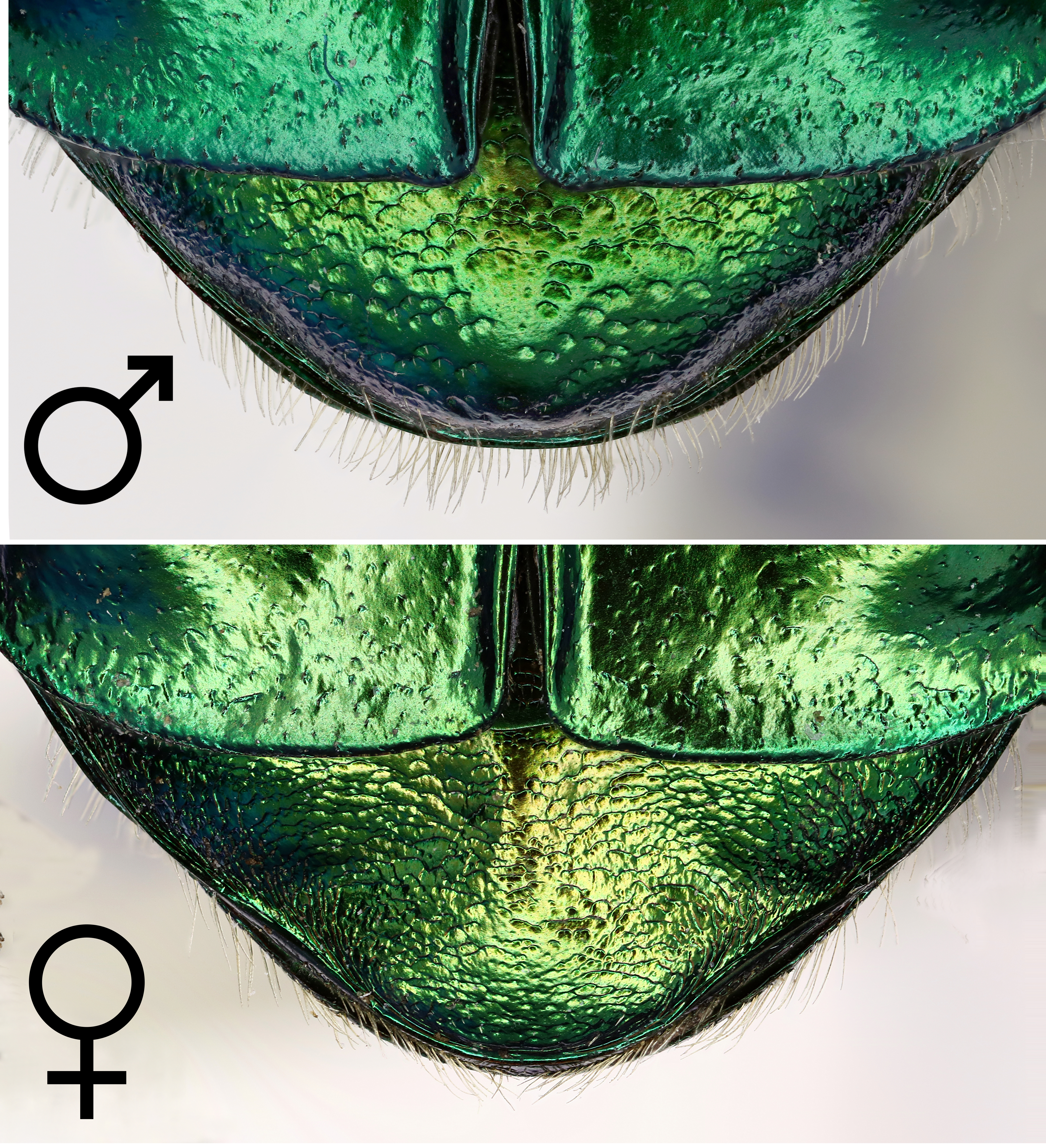 Pygidium von Protaetia affinis, oben Männchen, unten Weibchen